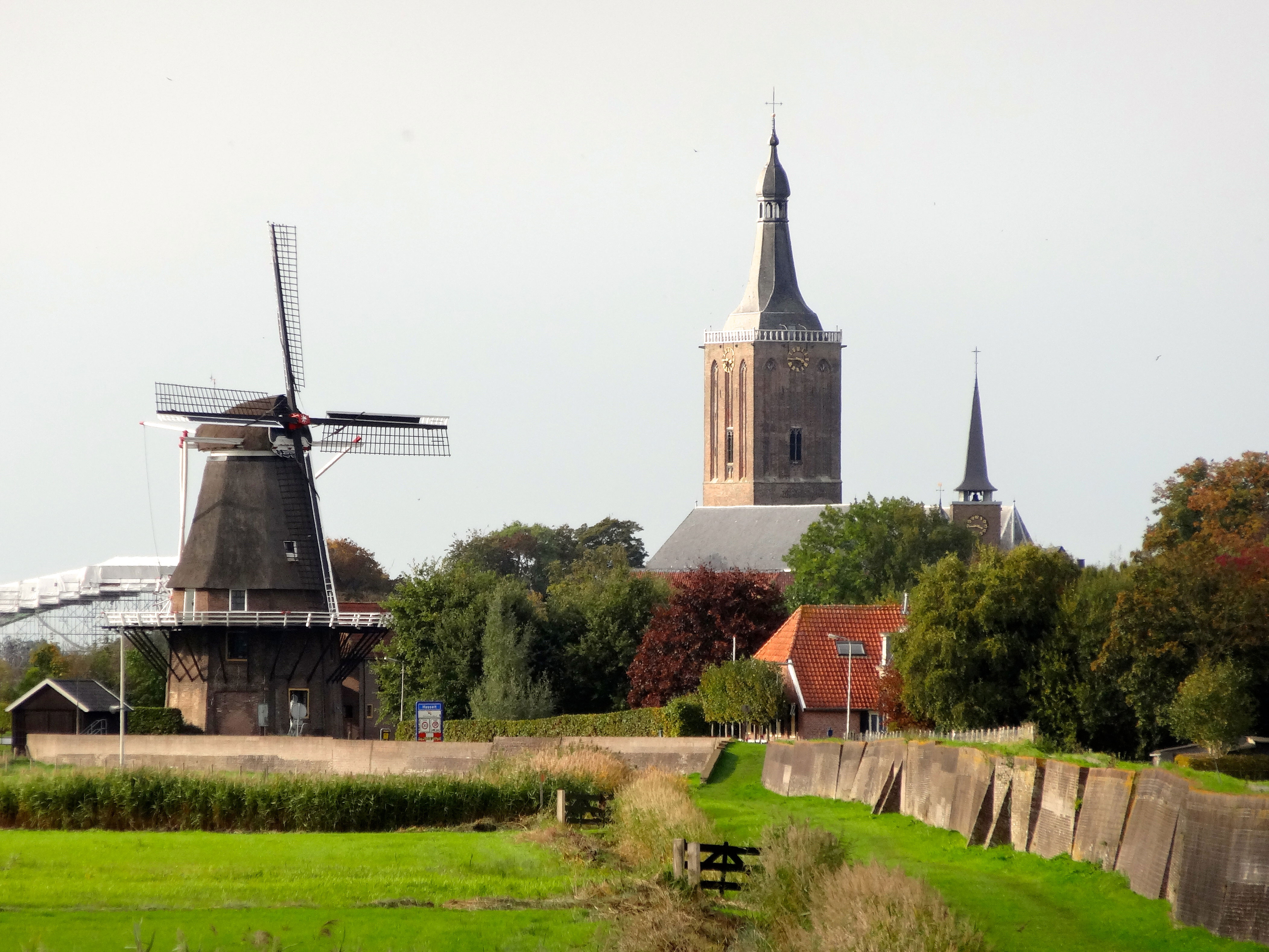 Zicht op Hasselt vanaf de Stenendijk, met vlnr molen De Zwaluw, de Grote of Sint-Stephanuskerk en de Heilige Stephanuskerk